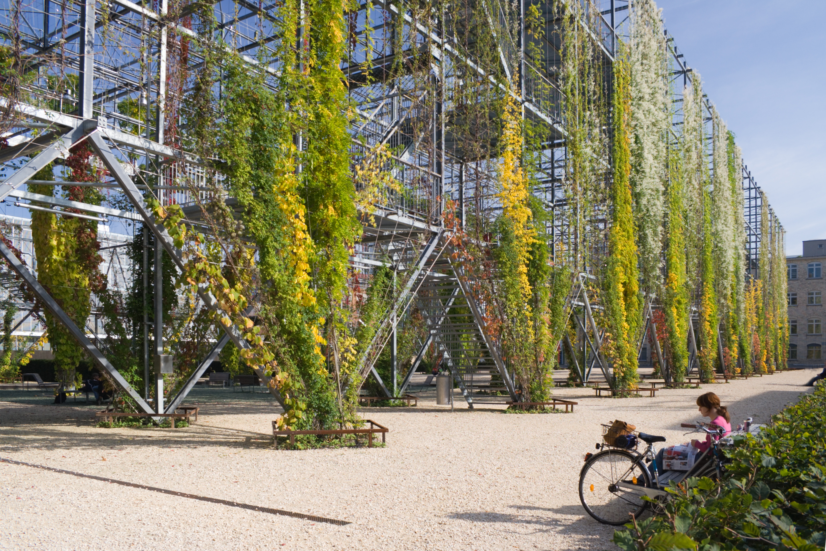 MFO-Park in Neu-Oerlikon, Zürich, Schweiz MFO steht für Maschinenfabrik Oerlikon, die ehemalige Nutzerin dieses Geländes Einweihung im Sommer 2002, entworfen von der Planungsgruppe Burchhardt + Partner und Raderschall Landschaftsarchitekten gewann 2004 den Play & Leisure Award, 2003 den Public Design Preis, 2006 die Auszeichnung für gute Bauten der Stadt Zürich 2006